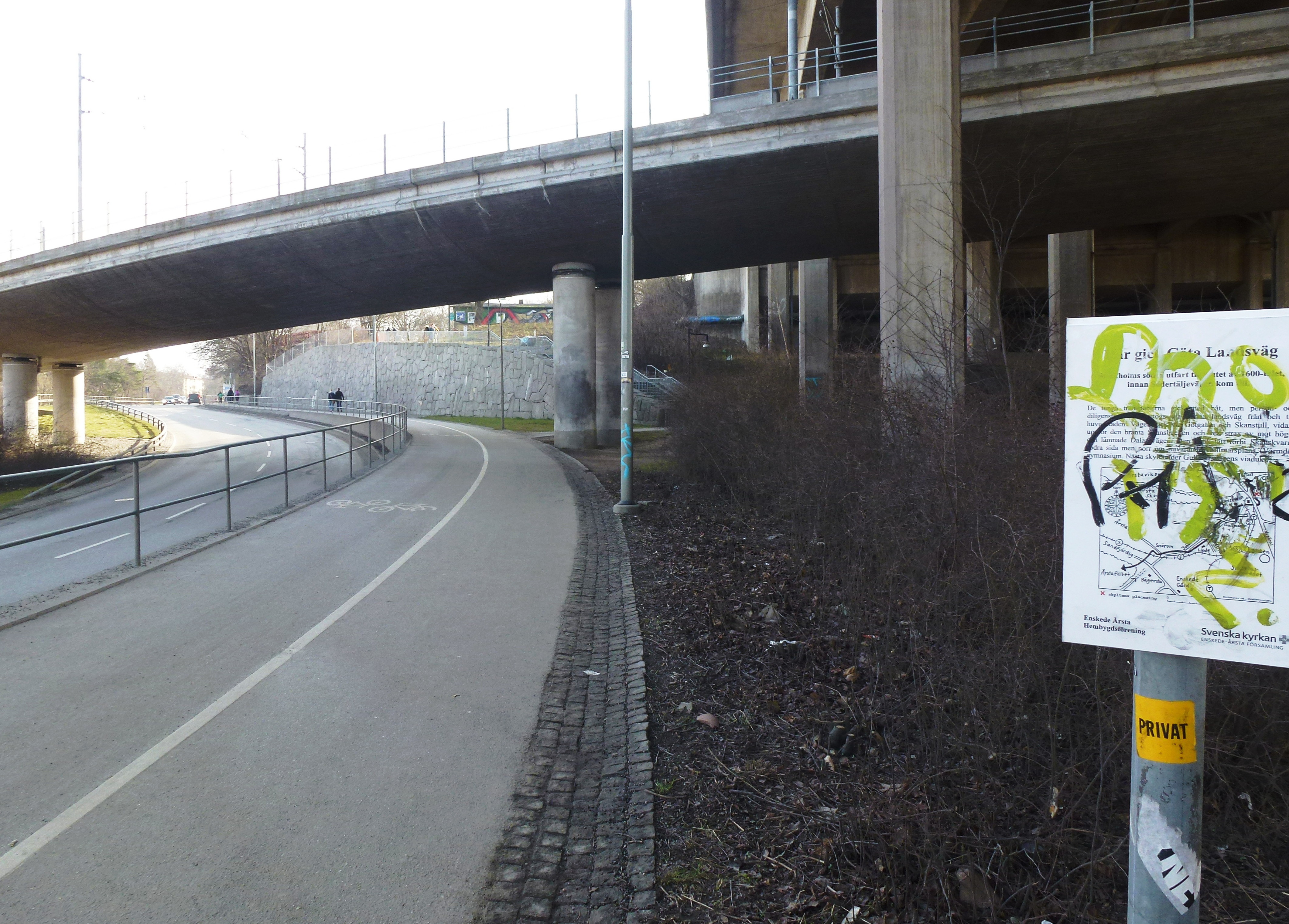 Hammarbybacken mot syd